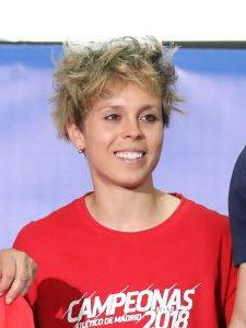 La alcaldesa de Madrid, Manuela Carmena, acompañada por buena parte de la Corporación municipal, ha recibido hoy a los equipos femenino y masculino de fútbol del Atlético de Madrid, que han venido a celebrar con los madrileños los títulos de Liga femenino y de la Europe League masculino. También presentes en este emotivo acto el presidente del club Enrique Cerezo, el consejero delegado Miguel Ángel Gil Marín y su junta directiva.